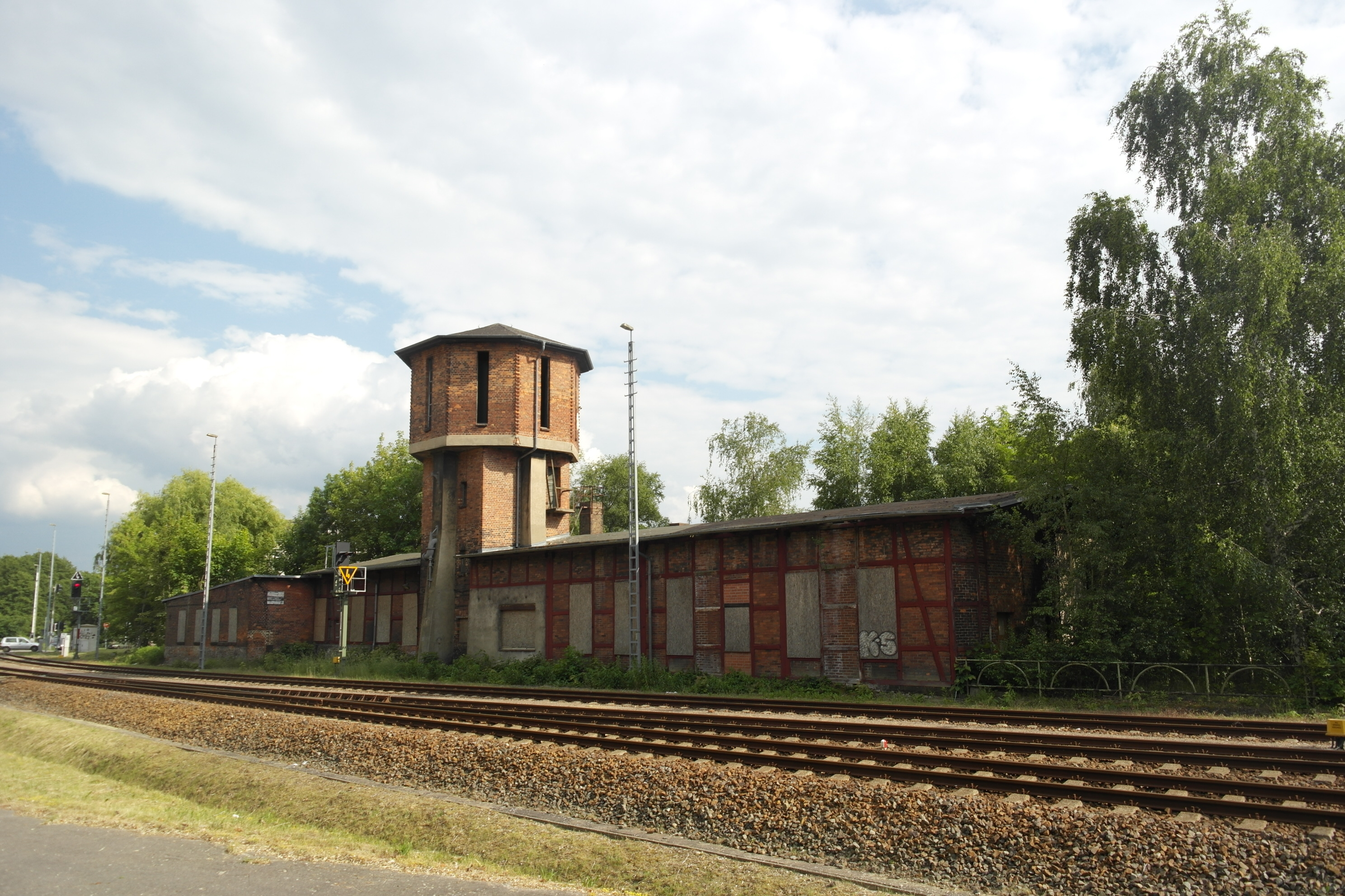 Bahnhof Wittstock, Baudenkmal, Bahnbetriebswerk mit Lokschuppen und Wasserturm